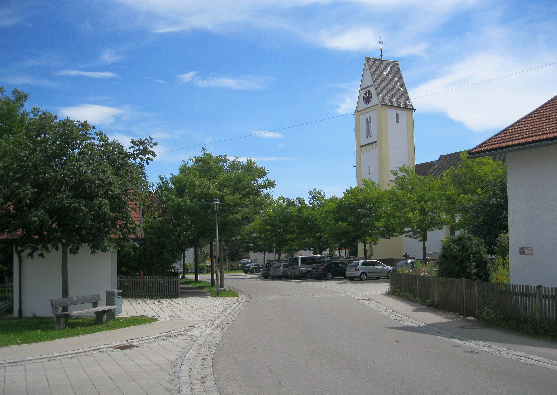 Ortszentrum von Irsingen; Kirche St. Margareta